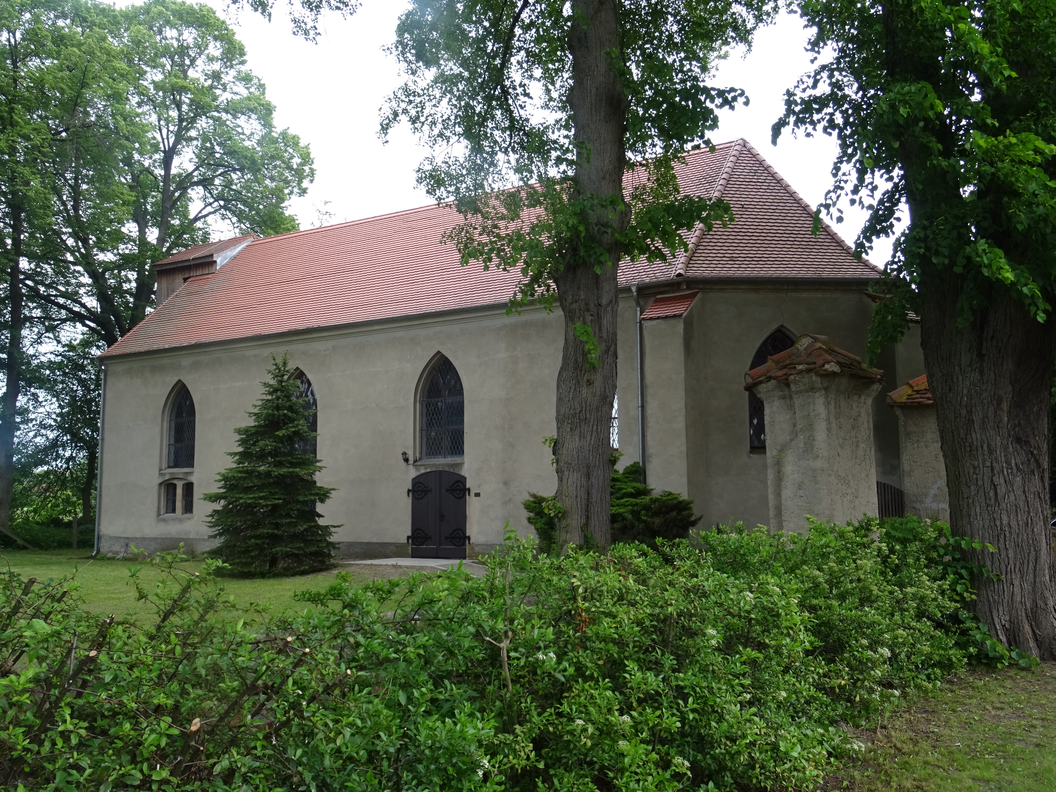 denkmalgeschützte Kirche in Liepgarten